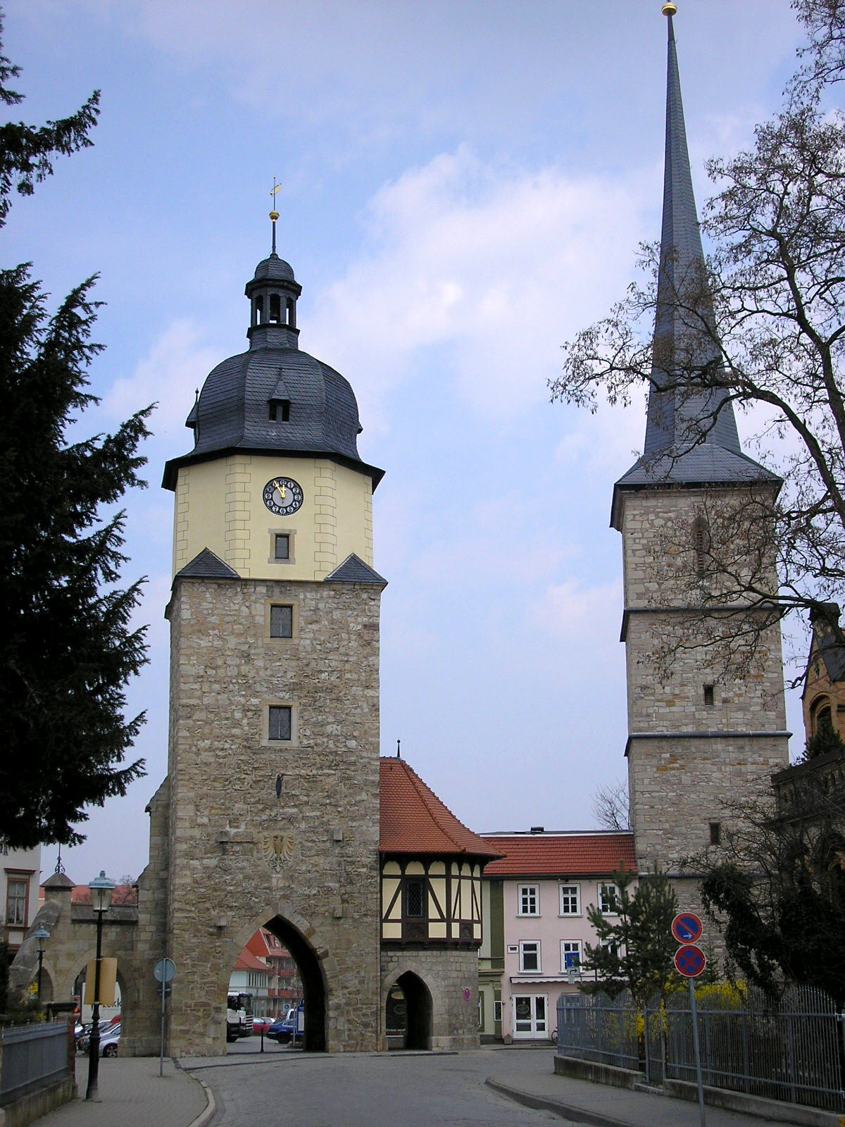 Riedtor in Arnstadt (Thüringen).